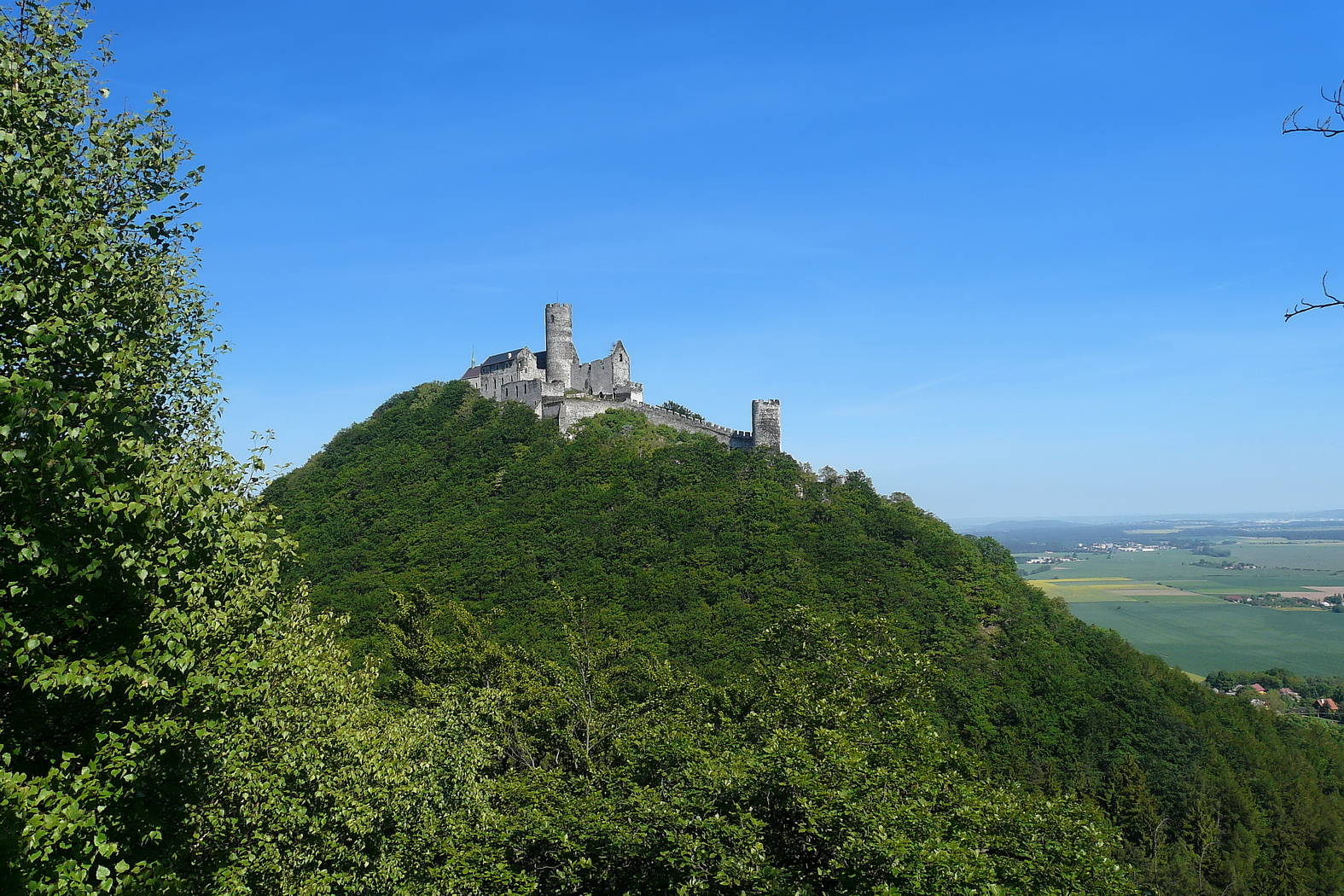 Velký Bezděz a hrad z Malého Bezdězu